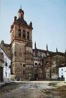 Catedral de San Sebastián